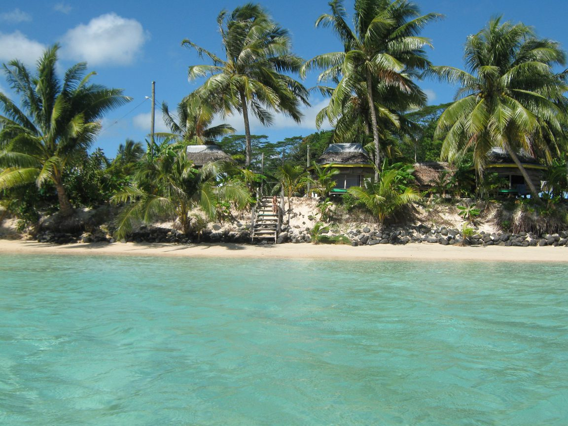 Tanu Beach Front